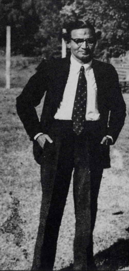 Abbasuddin Ahmed (1901-1959) Bangladeshi folk singer.